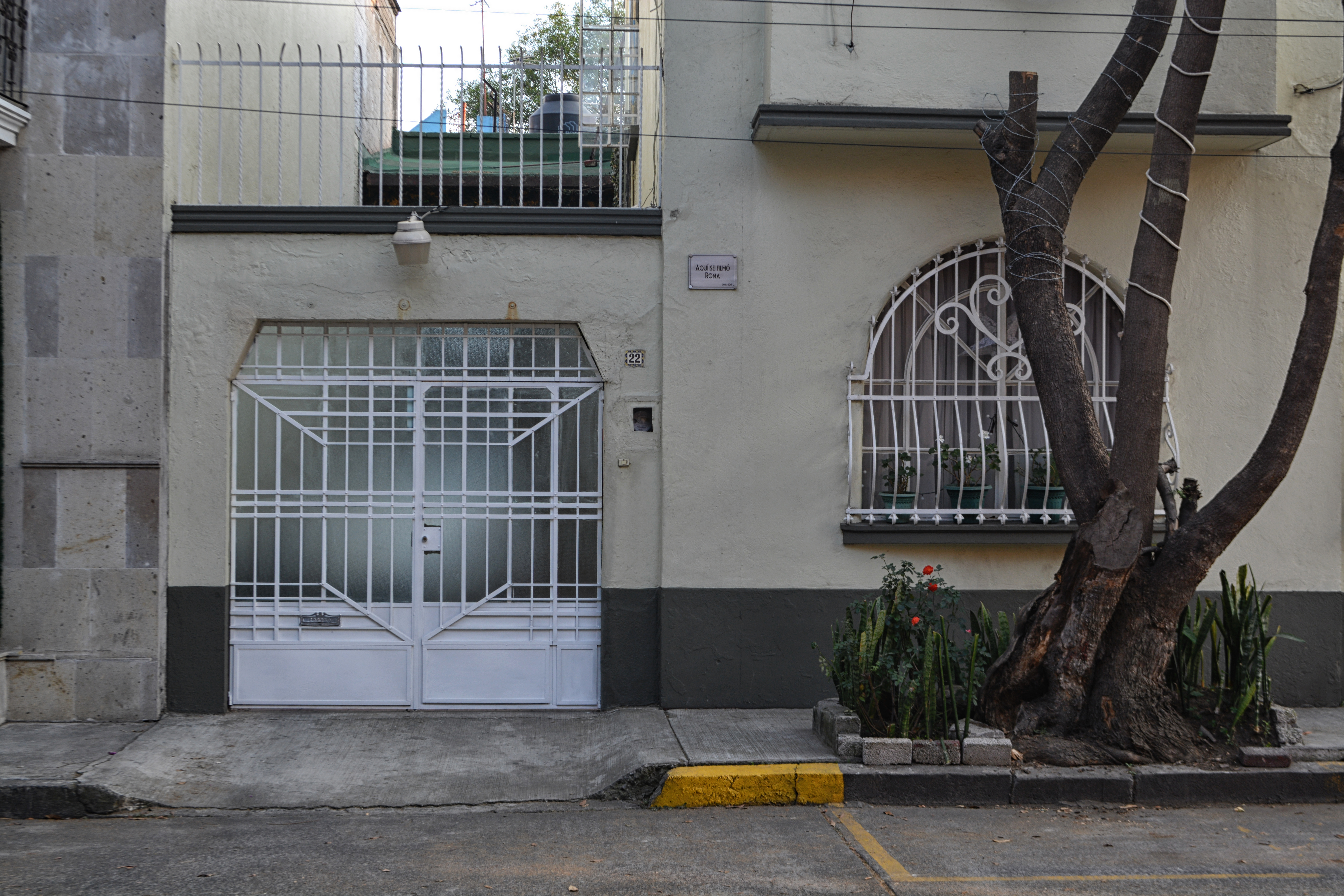 Roma (2018 film) filming locations, Mexico City.